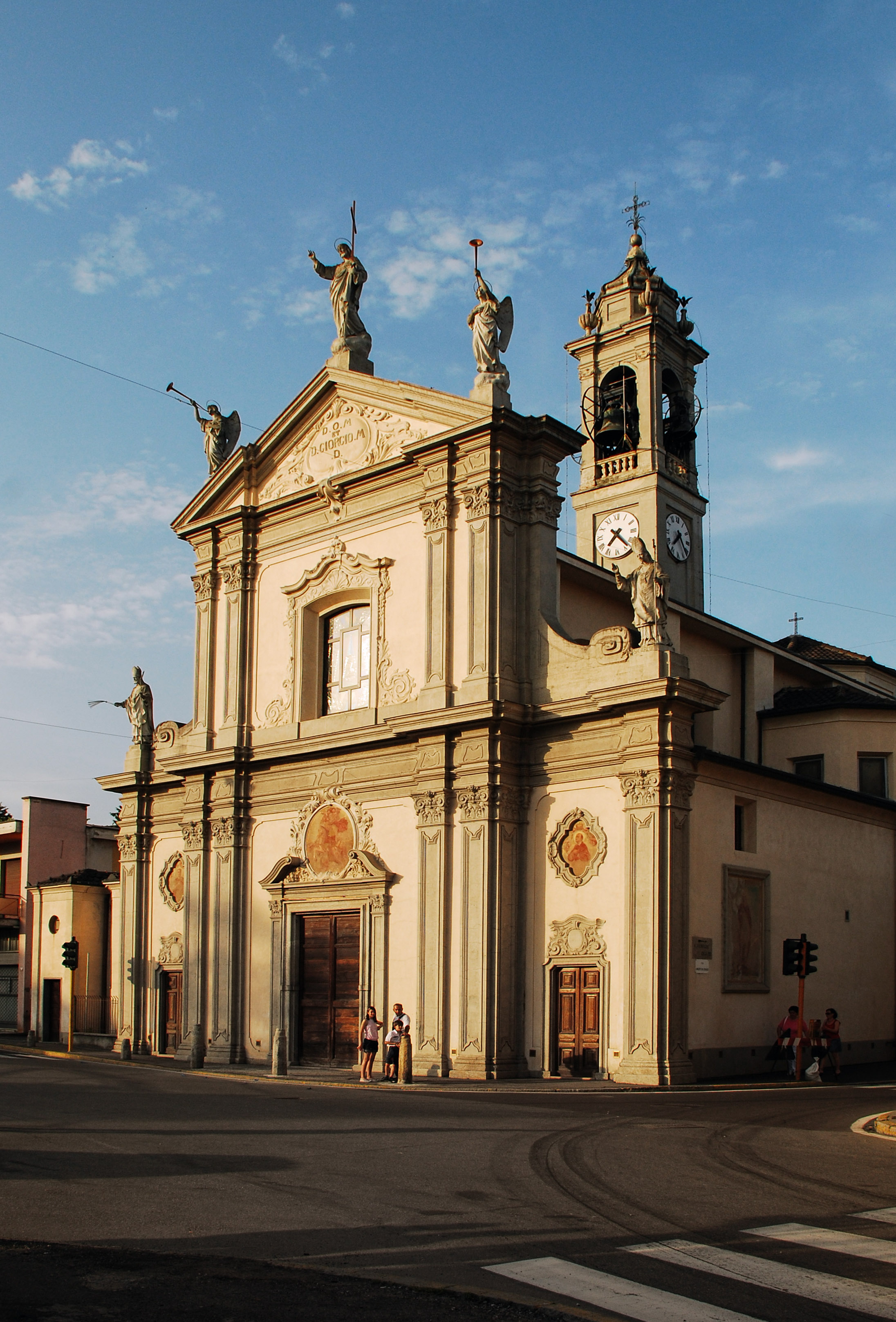 La chiesa di San Giorgio Martire a Lurago Marinone